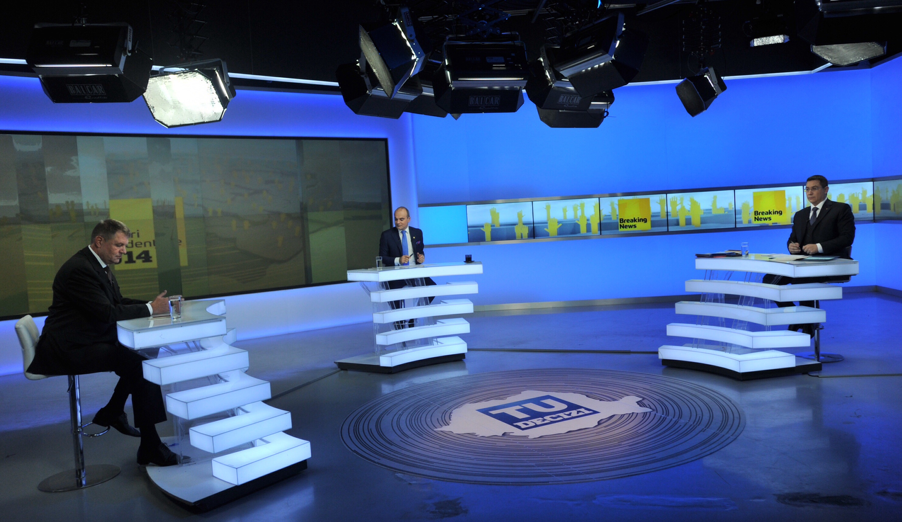 Victor Ponta la dezbatere Realitatea TV - 11.11 (1)